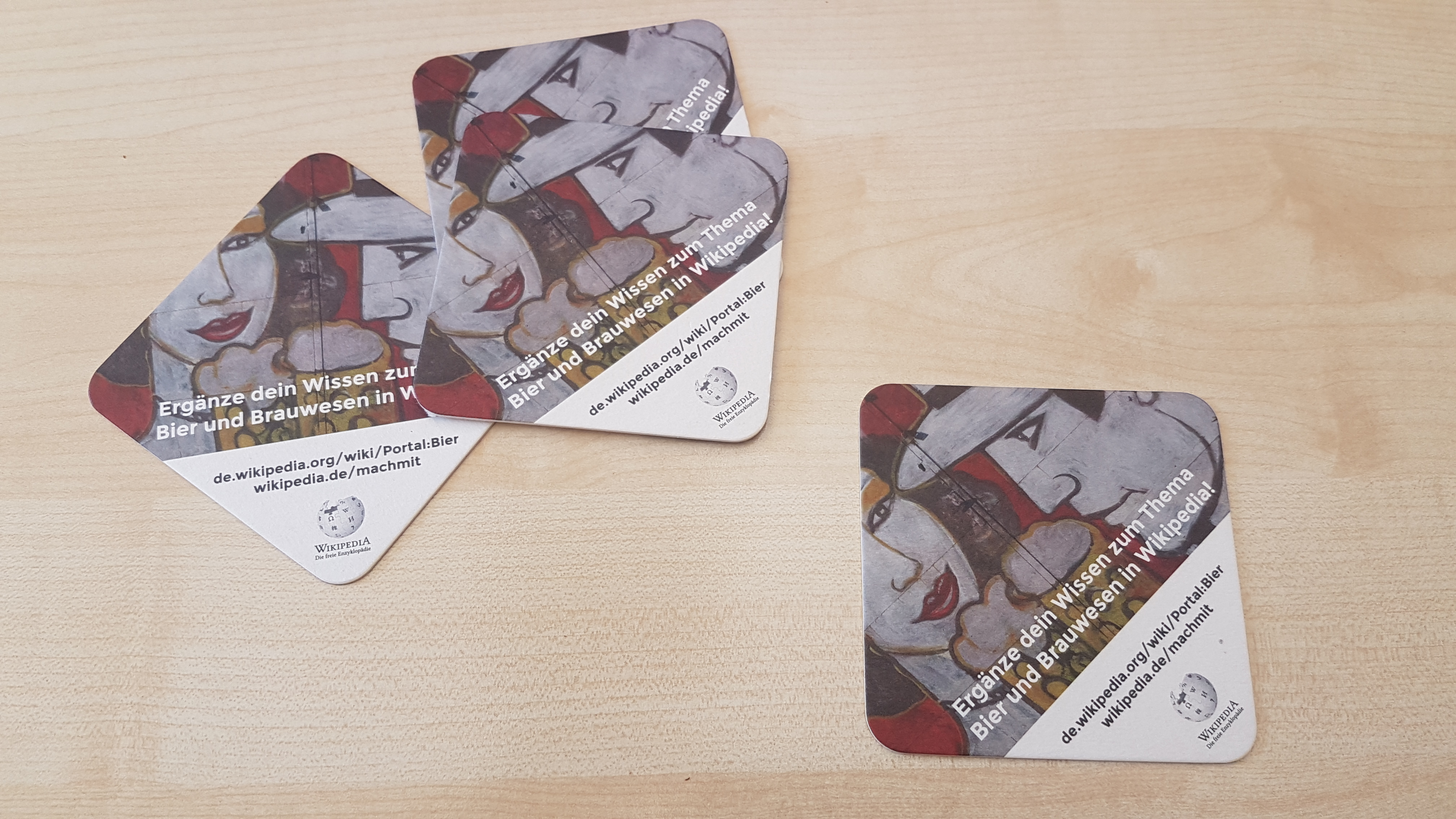 Wikipedia-Bierdeckel